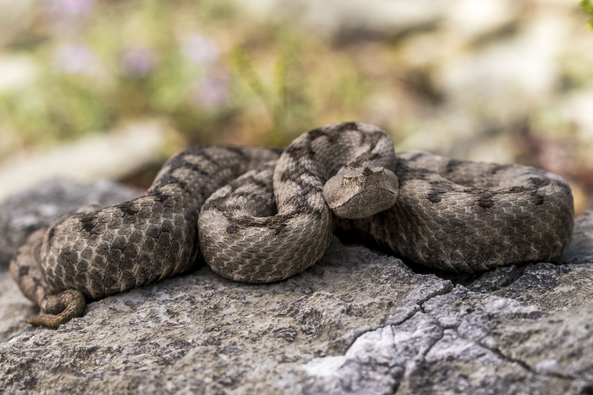 Parco naturale delle Dolomiti Friulane (Q683241)